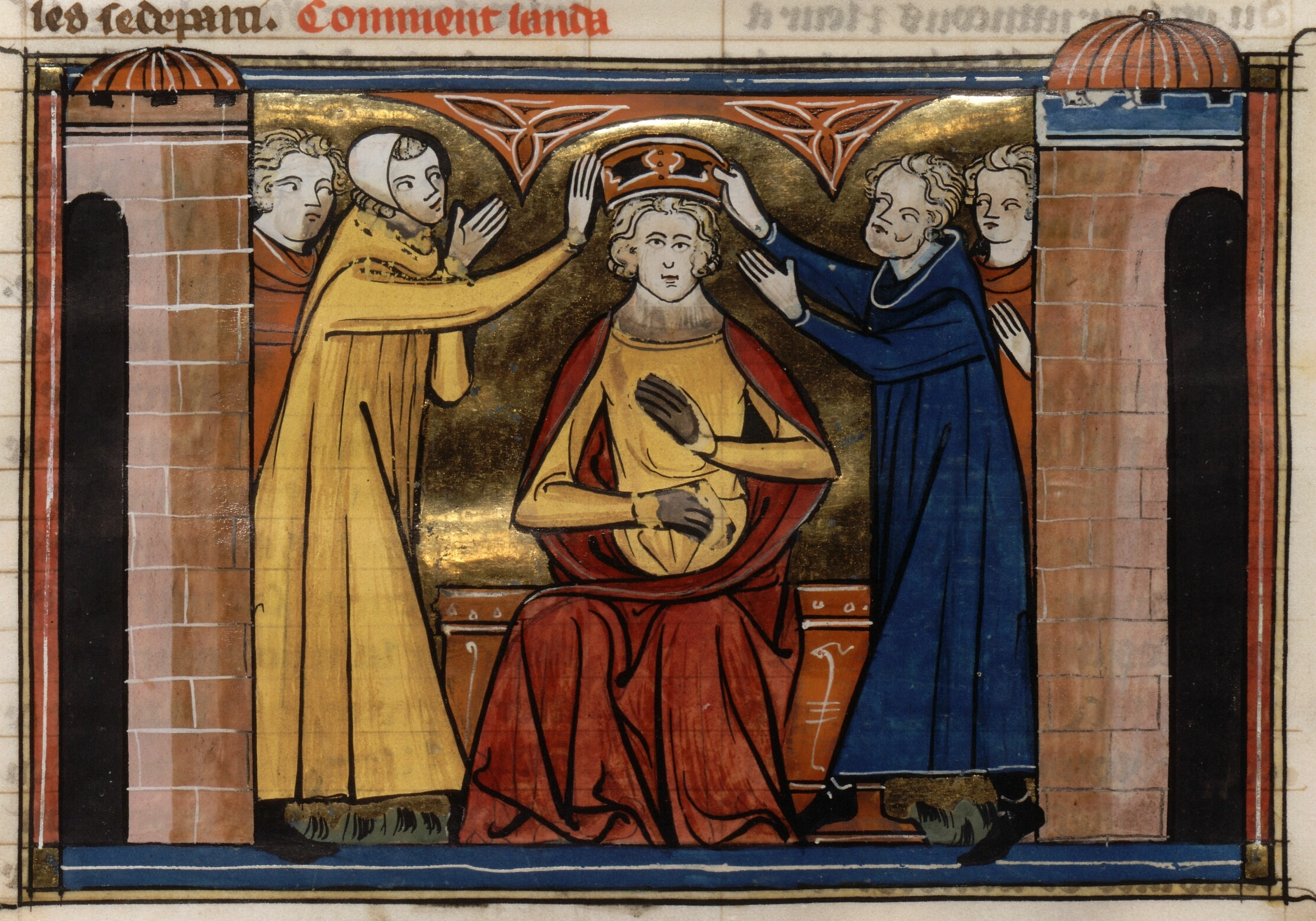 Couronnement de Conrad IV